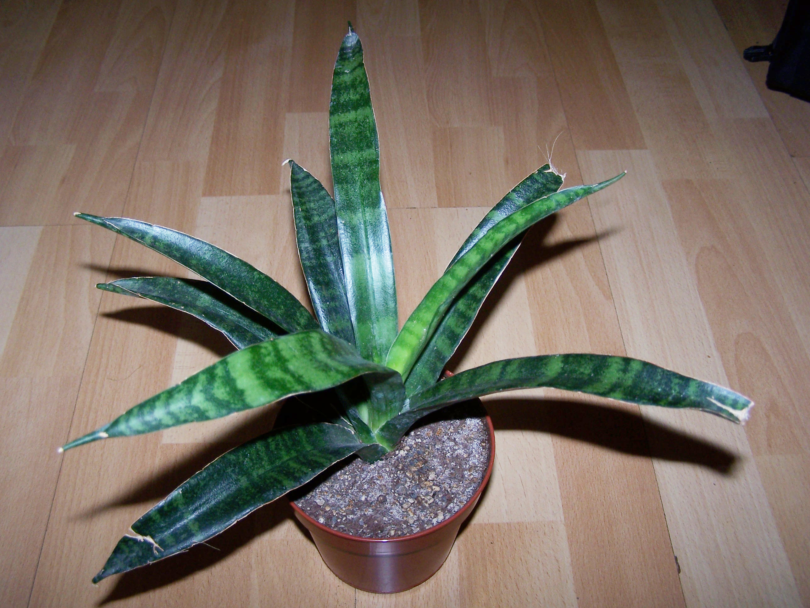 Sansevieria parva (Habitus)